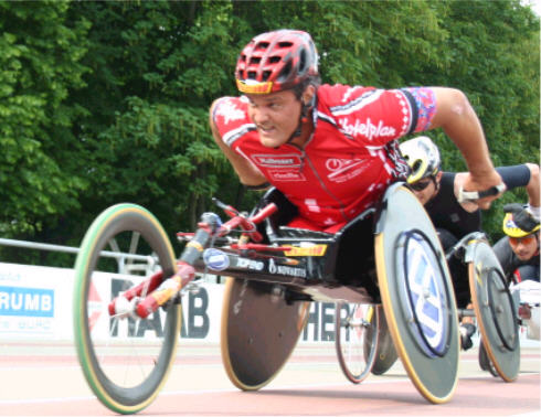 Franz Nietlispach, Mannheim